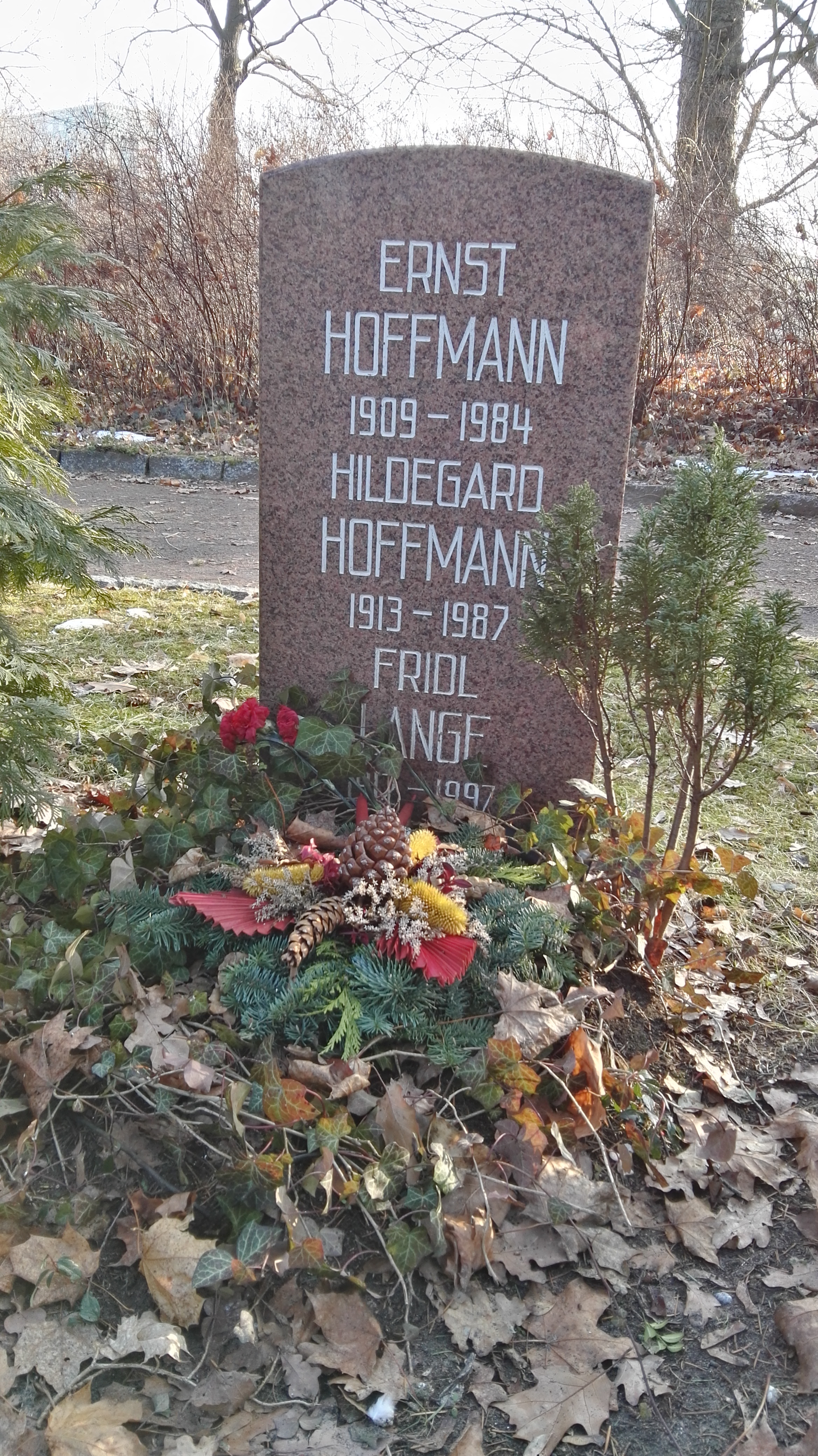 Grab von Ernst Hoffmann, Hildegard Hoffmann und Fridl Lang in der Grabanlage Pergolenweg auf dem Sozialistenfriedhof des Zentralfriedhofs Friedrichsfelde